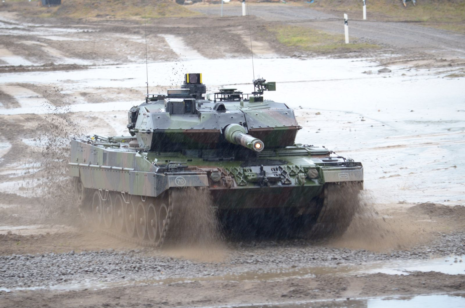 Eine Informationslehrübung (ILÜ) der Bundeswehr am 24.09.2012 in Bergen-Hohne Training Area.